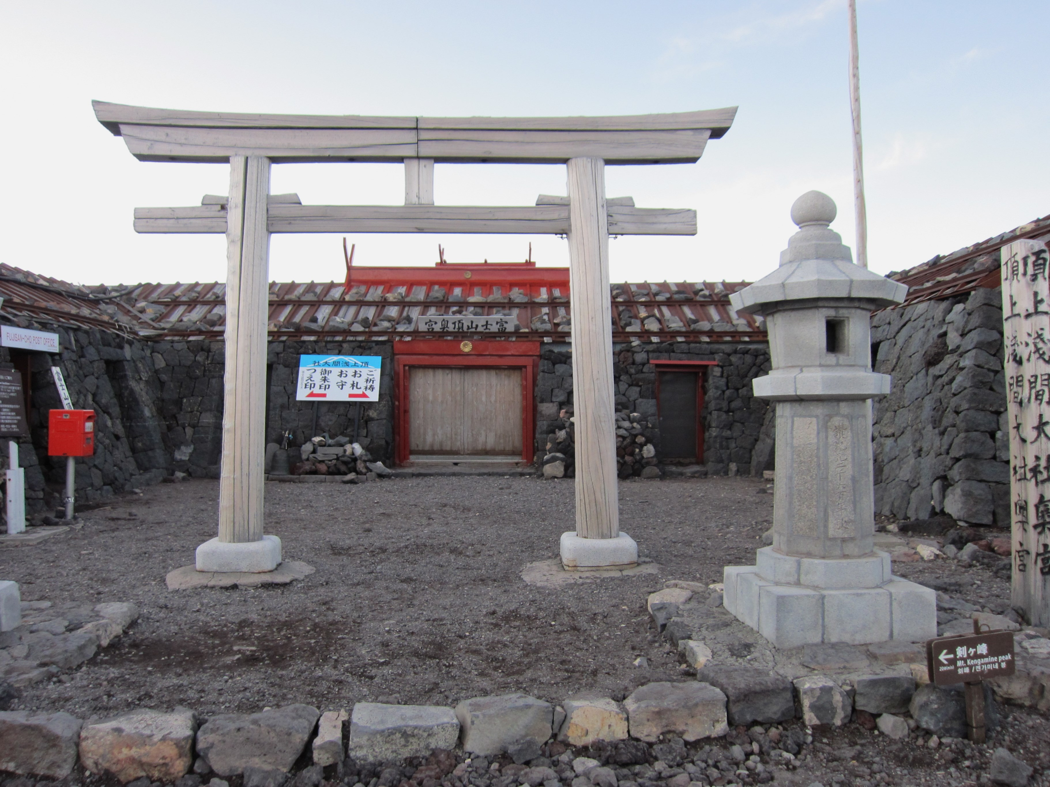 富士山本宮浅間大社 奥宮